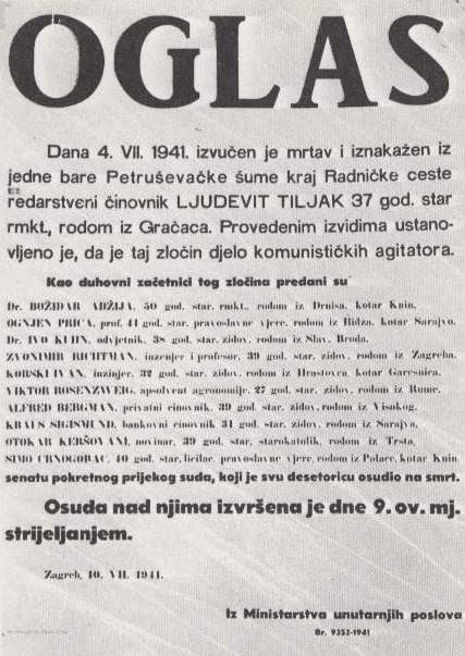 Oglas o napadu na Ljudevita Tiljka